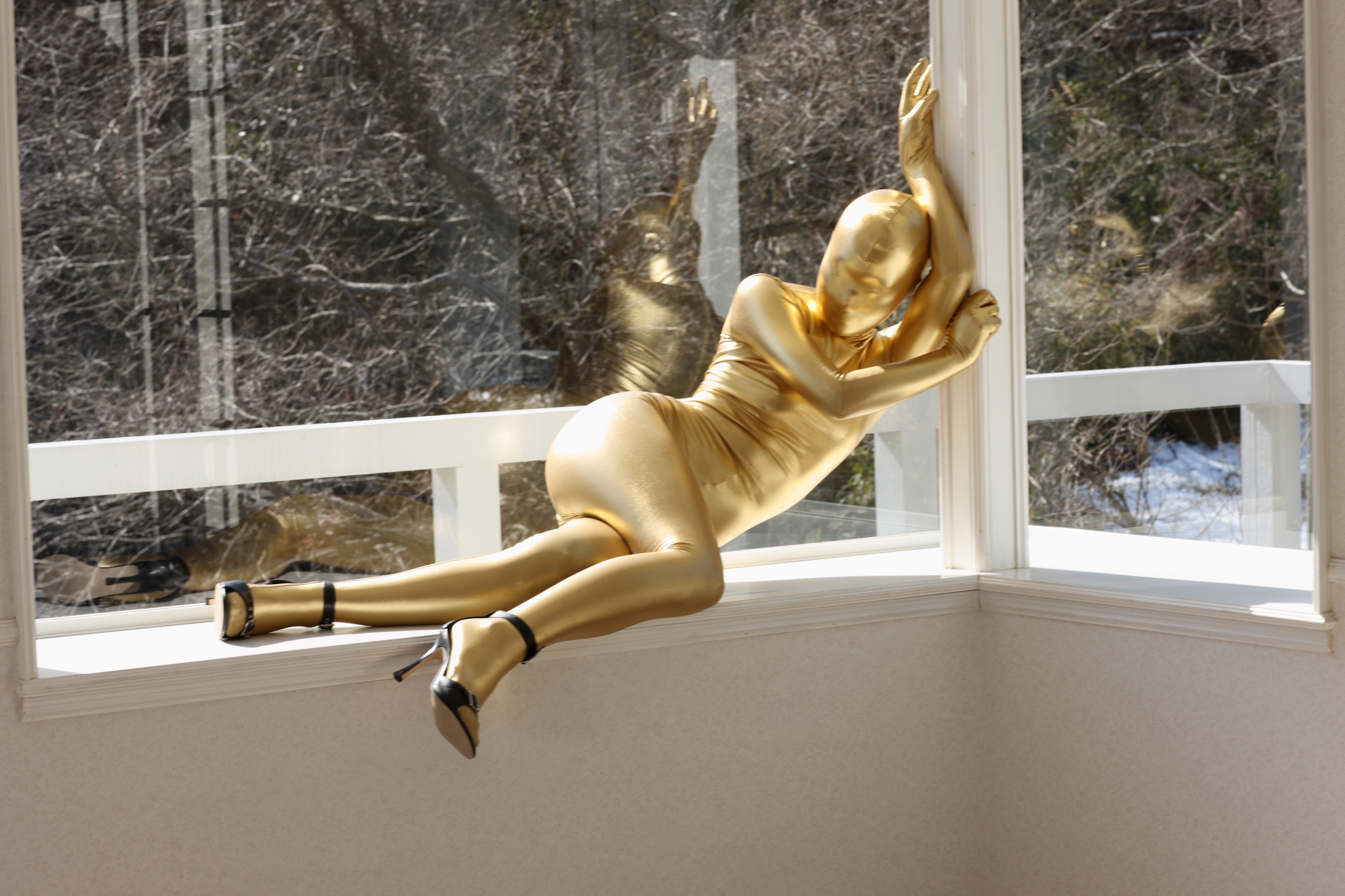 Gold Zentai